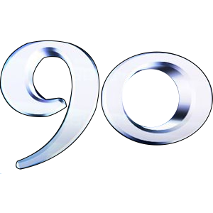 Logotipo del noticiero 90 segundos de frecuencia latina